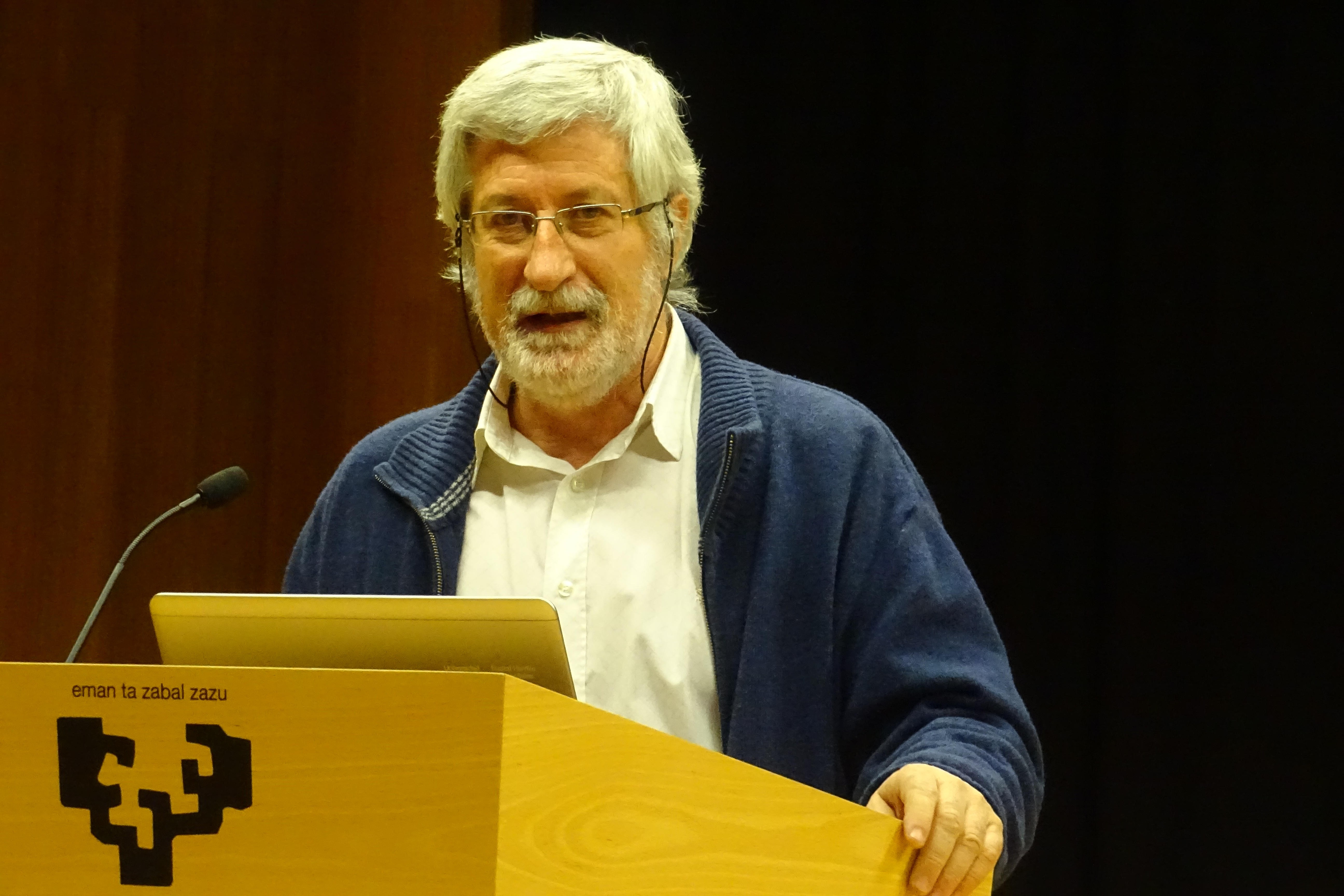 Josu Chueca, Donostian, 2017ko azaroan.